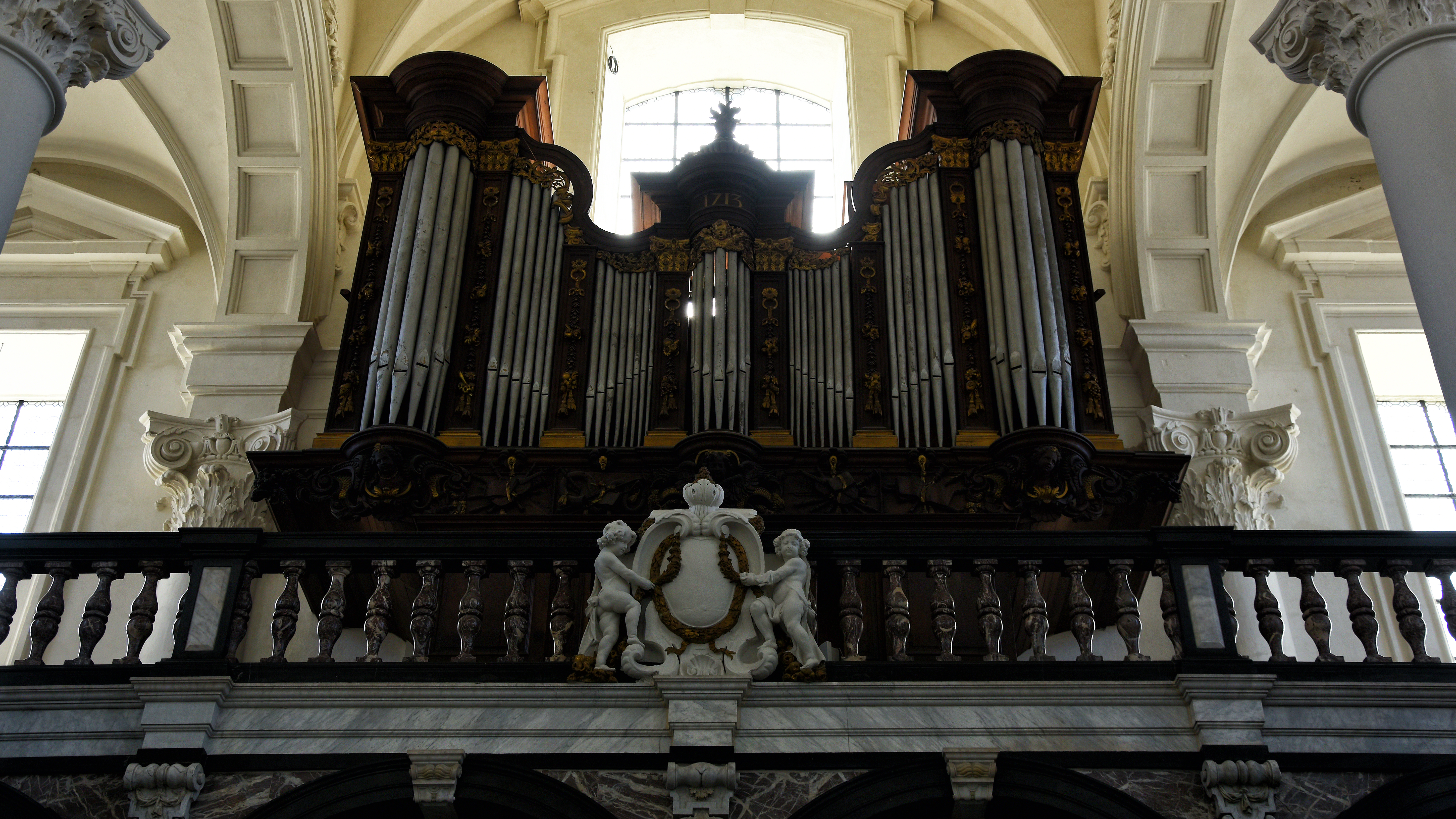 Kerkorgel door Hendrik Frans Verbruggen Sint-Pieters-en-Pauluskerk Mechelen